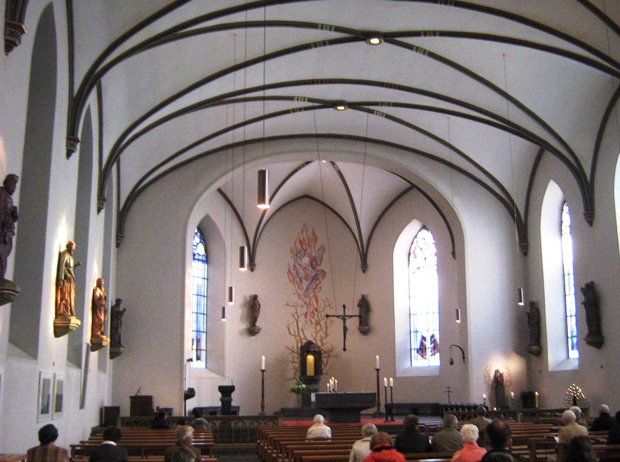 Kath. St.-Maurinus-Kirche, Leverkusen-Lützenkirchen, Inneres